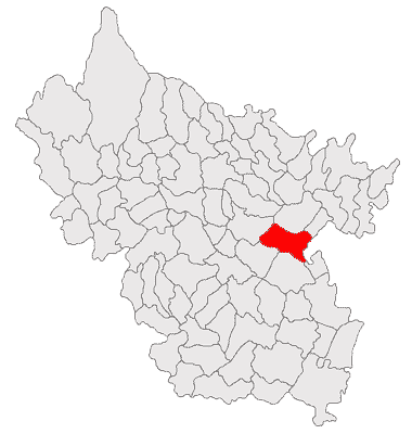 Categorie:Hărţi ale judeţului Buzău